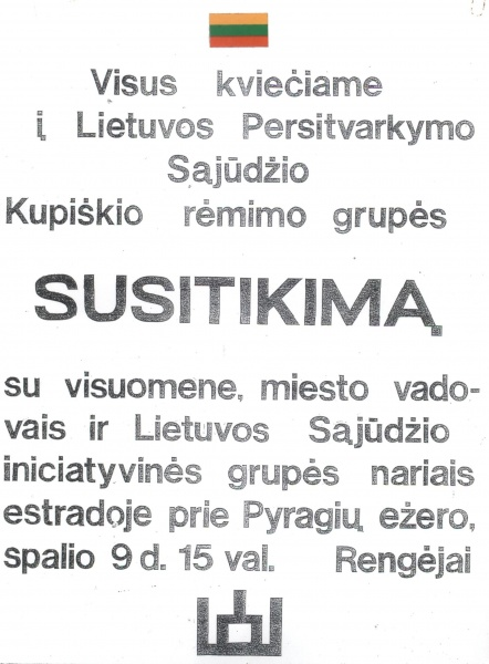 Pirmasis Sąjūdžio mitingas prie Pyragių ežero. 1988 10 09